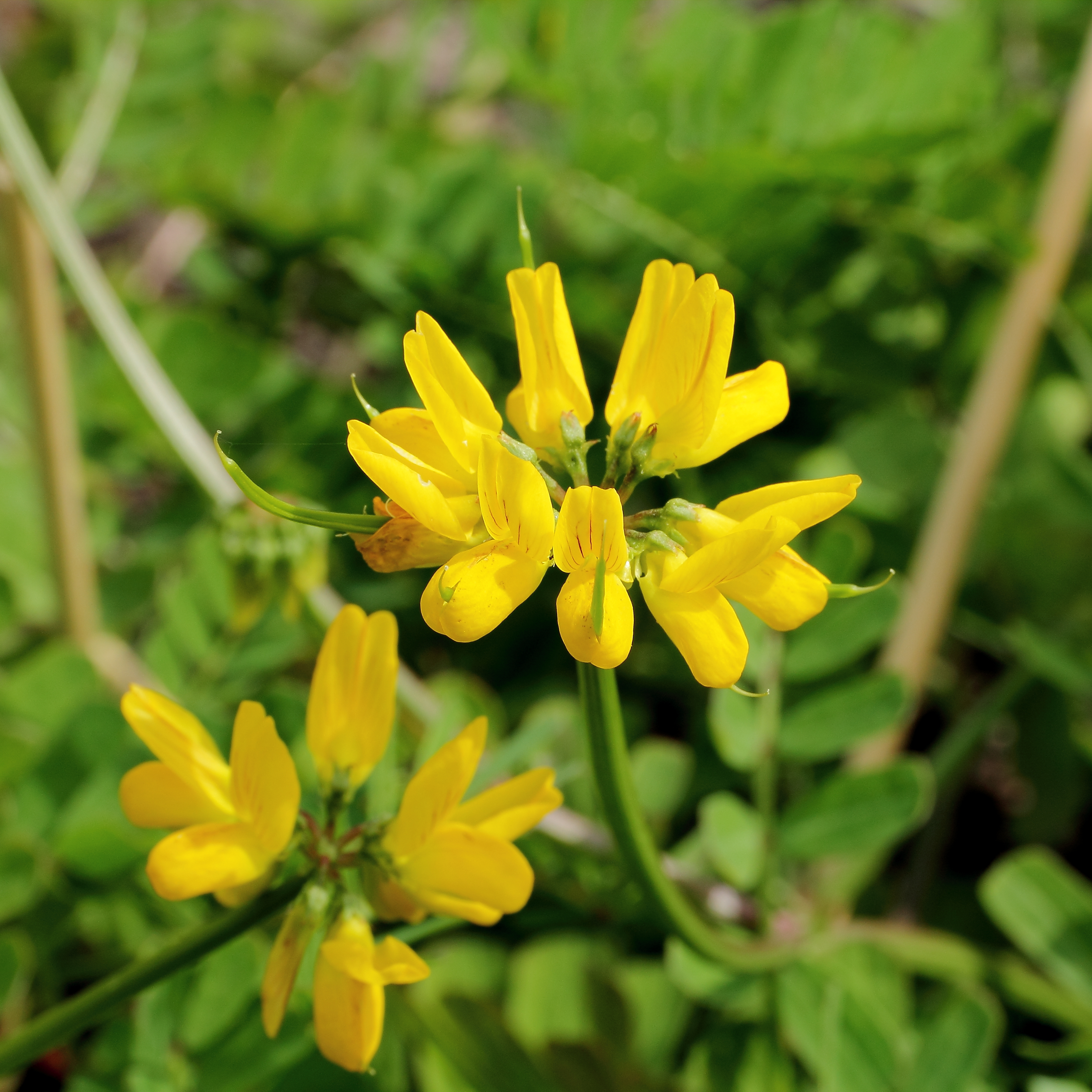 Securigera securidaca i Bergianska trädgården.